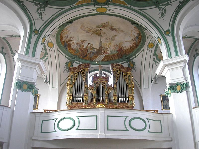 Pfarrkirche St. Vitus (Egling an der Paar, Landkreis Landsberg am Lech, Oberbayern). Blick zur Orgel. Eigene Aufnahme, Okt. 2006 / Parish church St. Vitus (Egling an der Paar, Upper Bavaria, Germany). Looking to the organ. Own photo, Oct. 2006